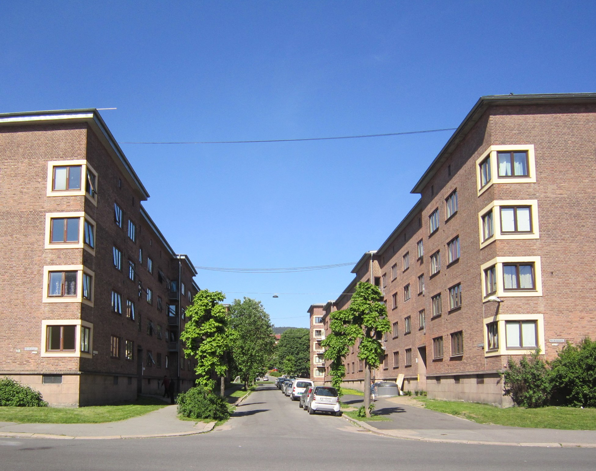 Edvard Griegs allé på Torshov i Oslo